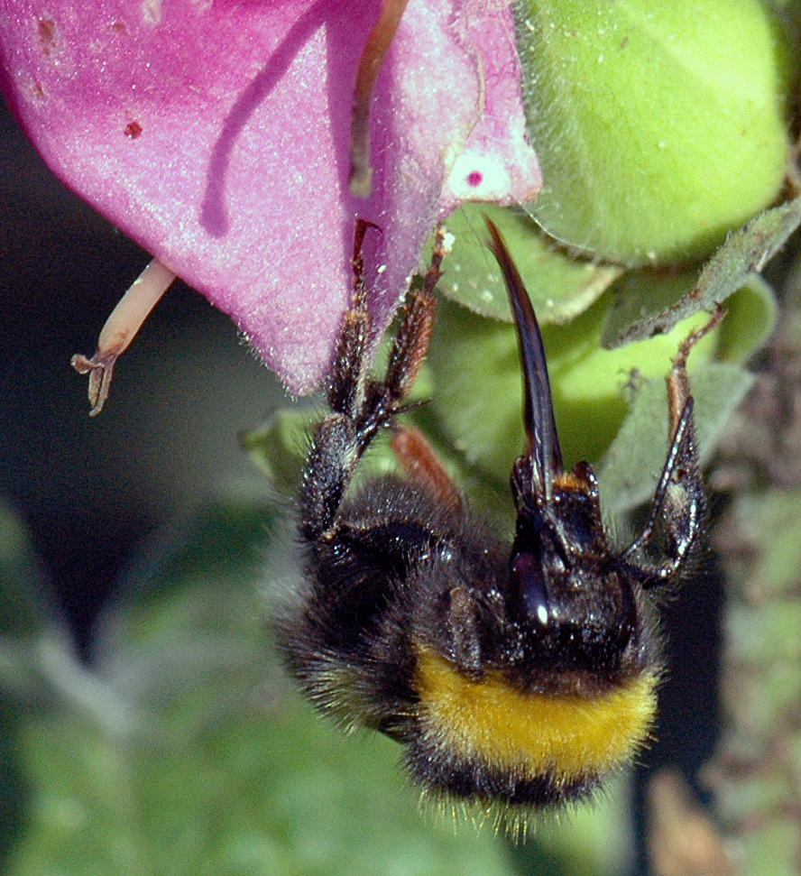 Saugrüssel einer Gartenhummel (Bombus hortorum)